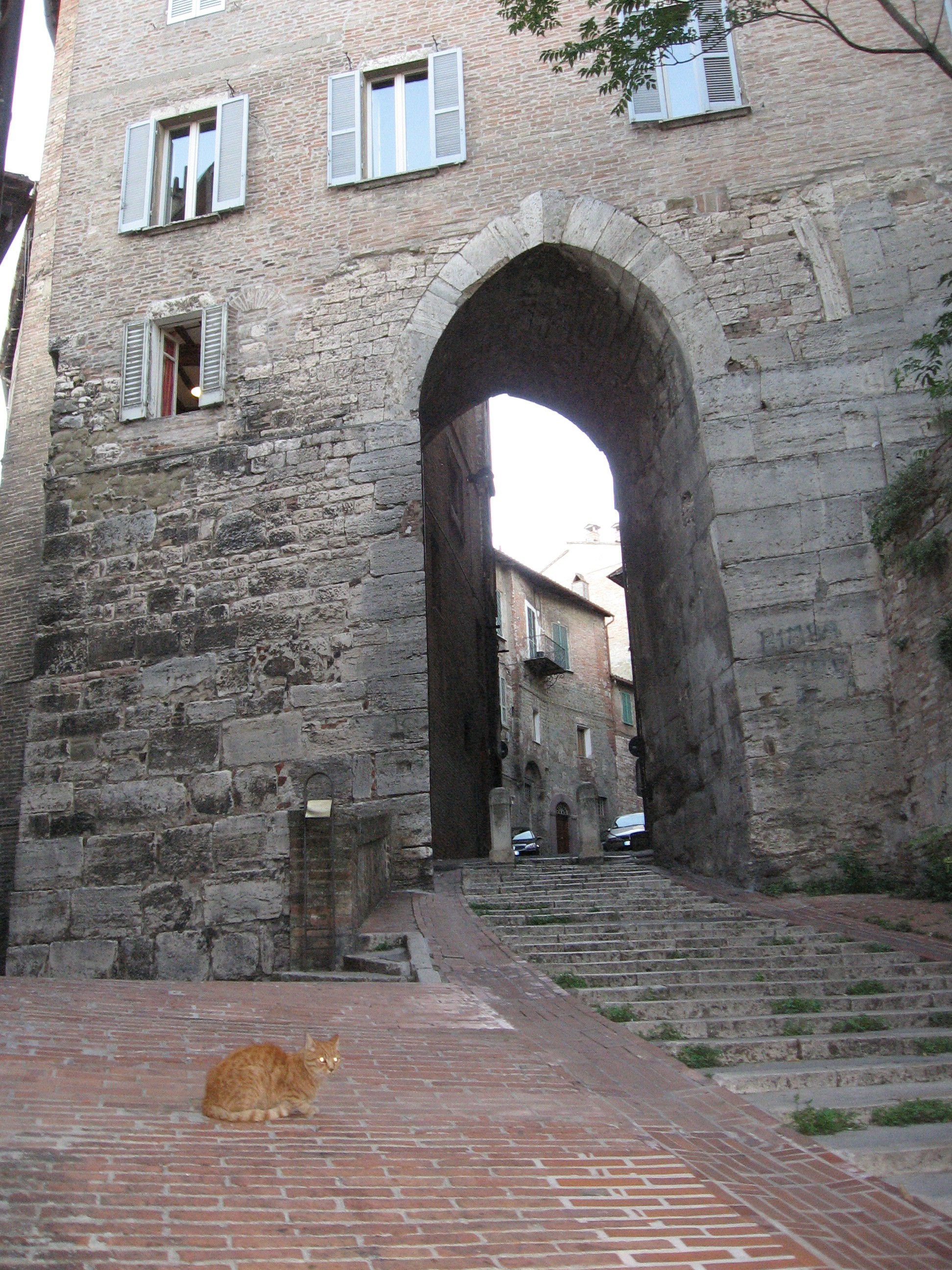 Perugia, settembre 2006Perugia